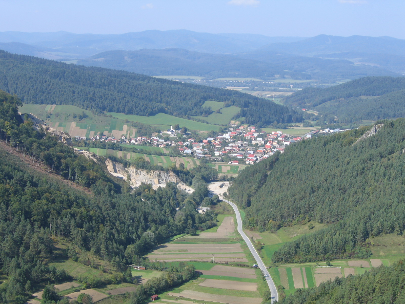 Jablonove (near Bytča) from Súľov rocks, sept 2006 author:Juloml